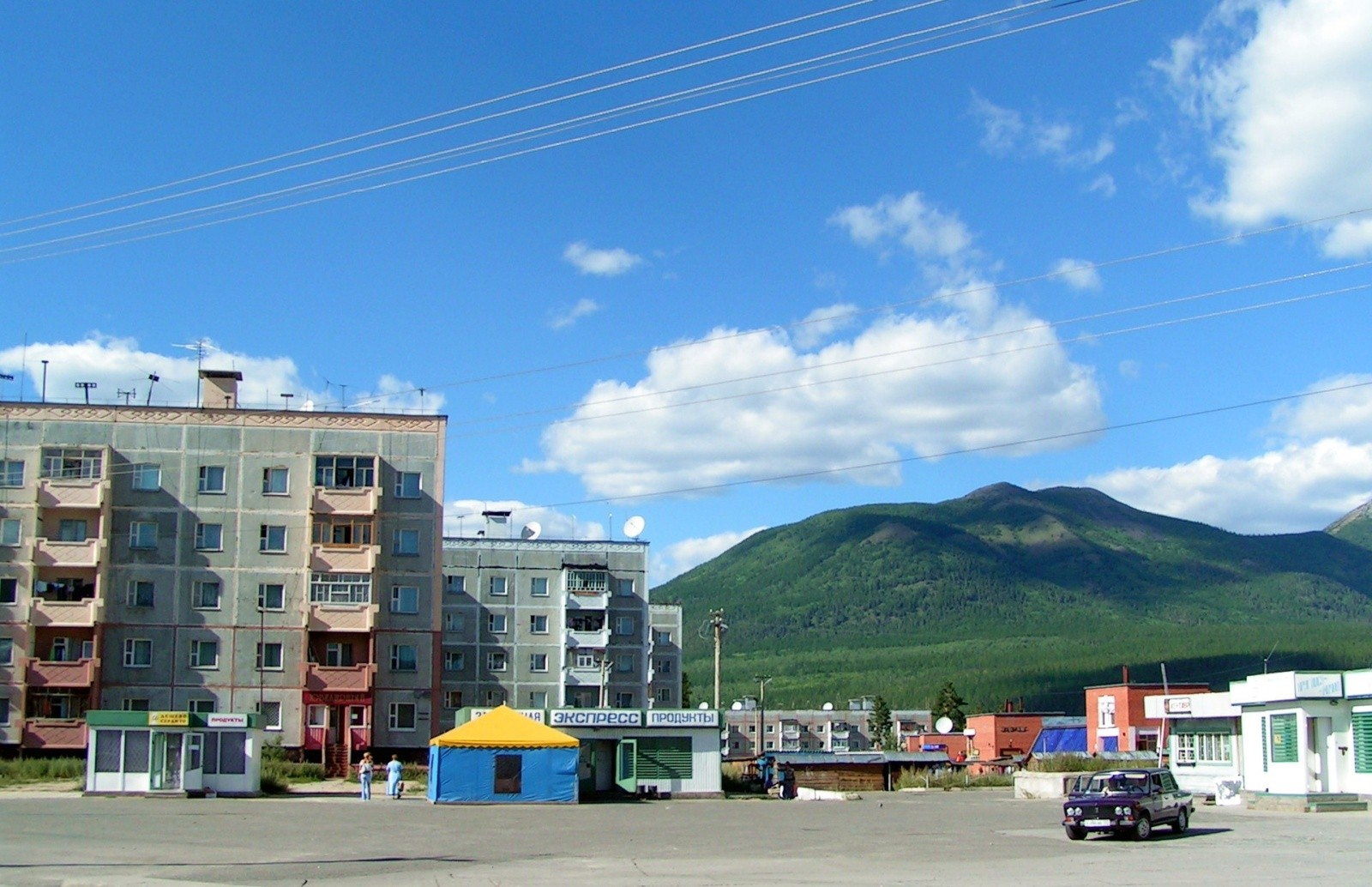 Пгт Таксимо, Бурятия, РФ. Городская площадь.